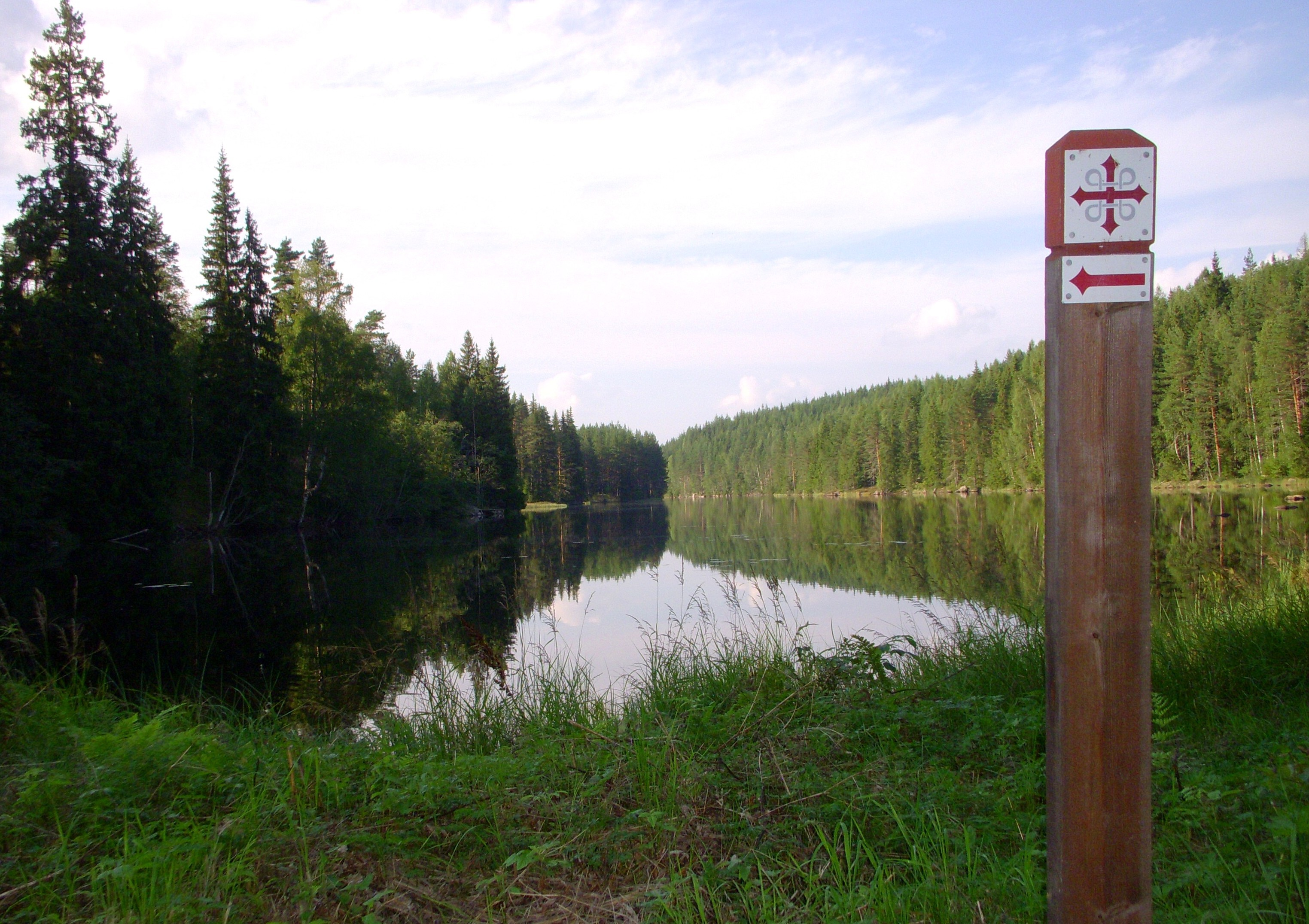 sjön Frötjärnen, Dalarna (vy mot norr) och markeringen för Pilgrimsleden Västerbergslagen